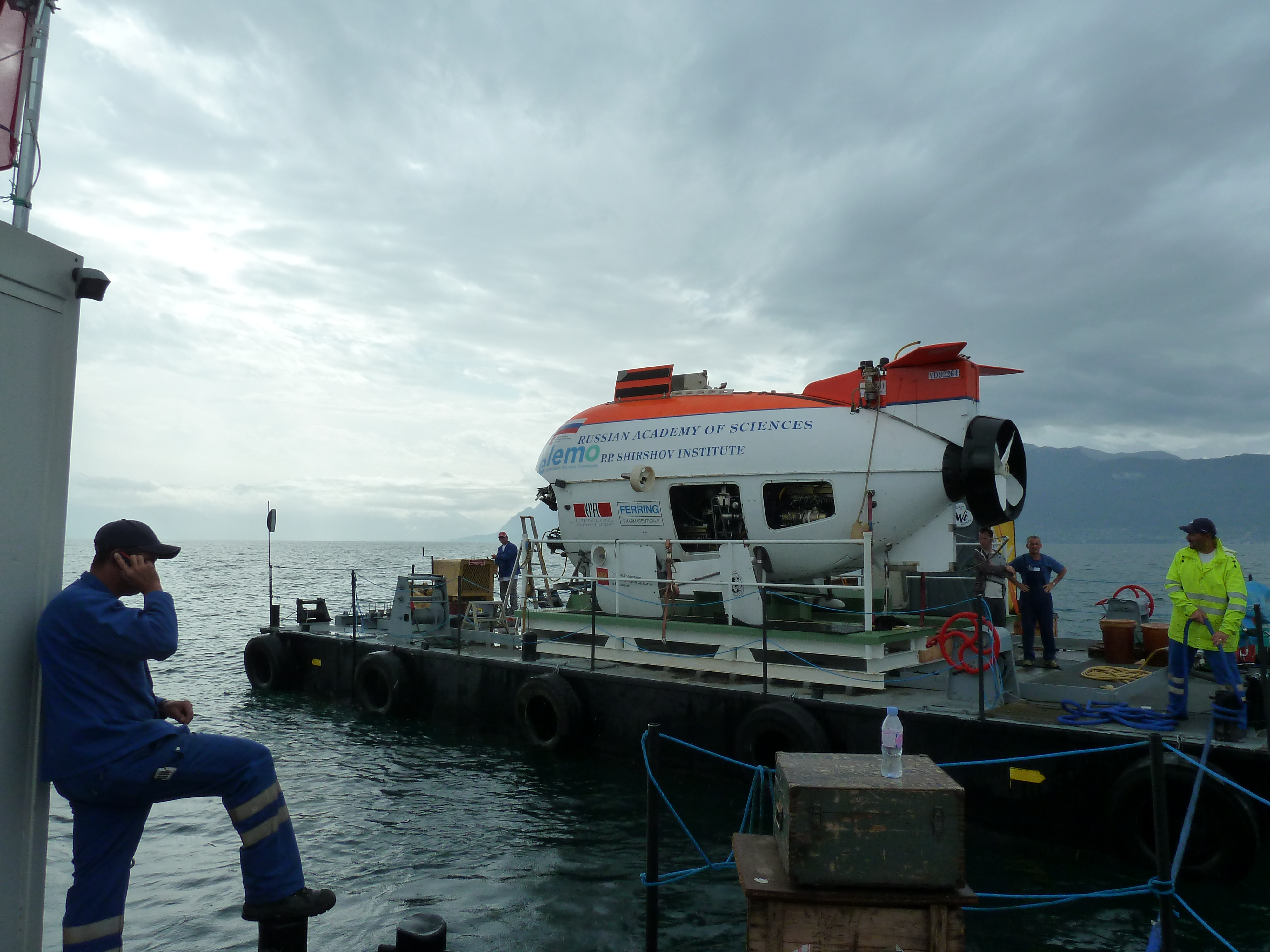 Das Fluss mit den beiden U-Booten, mitten auf dem Genfersee, kurz bevor der grosse Kran sie zu Wasser lässt.